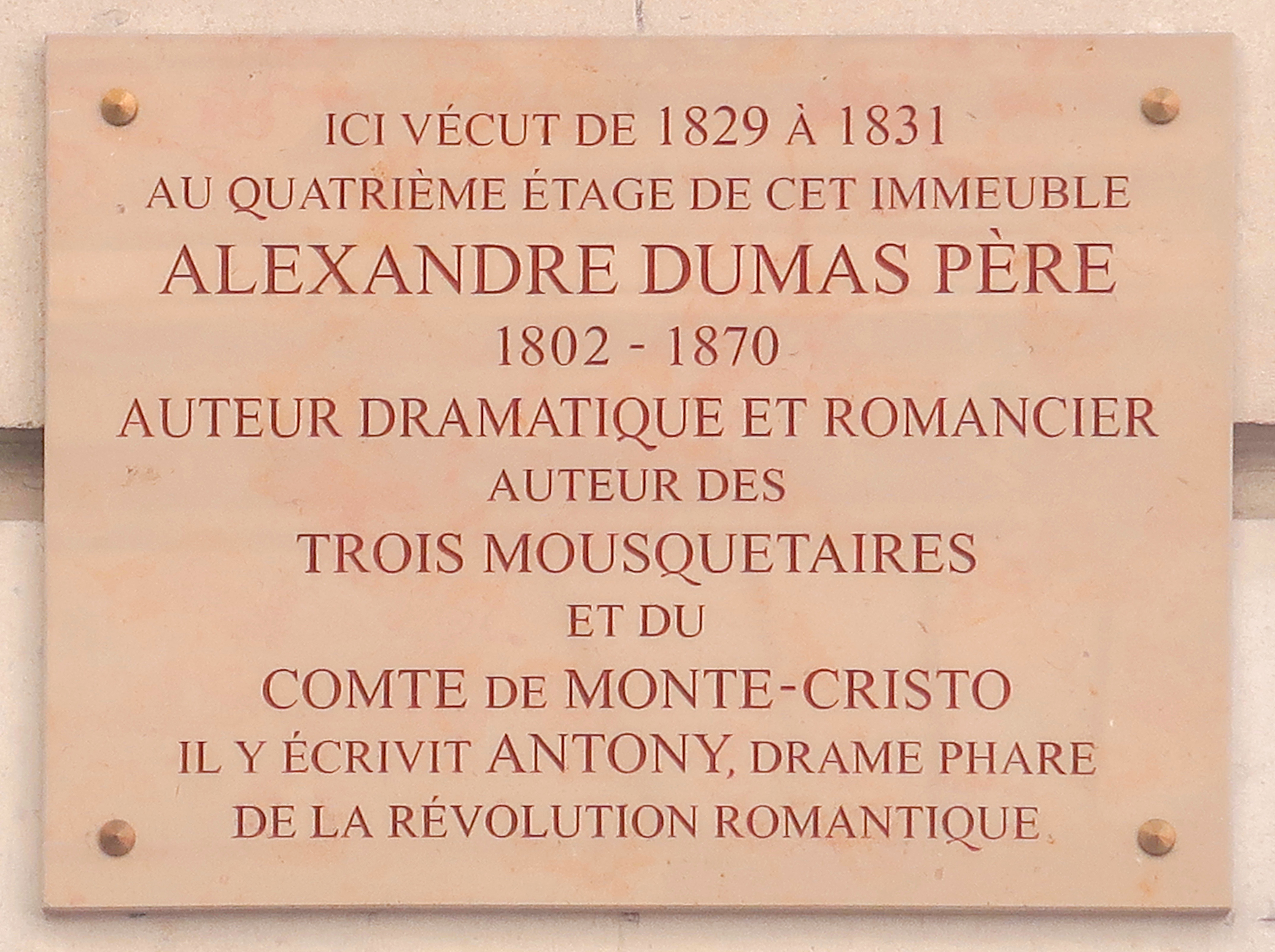 Plaque en hommage à Alexandre Dumas père, 25 rue de l'Université (Paris, 7e).